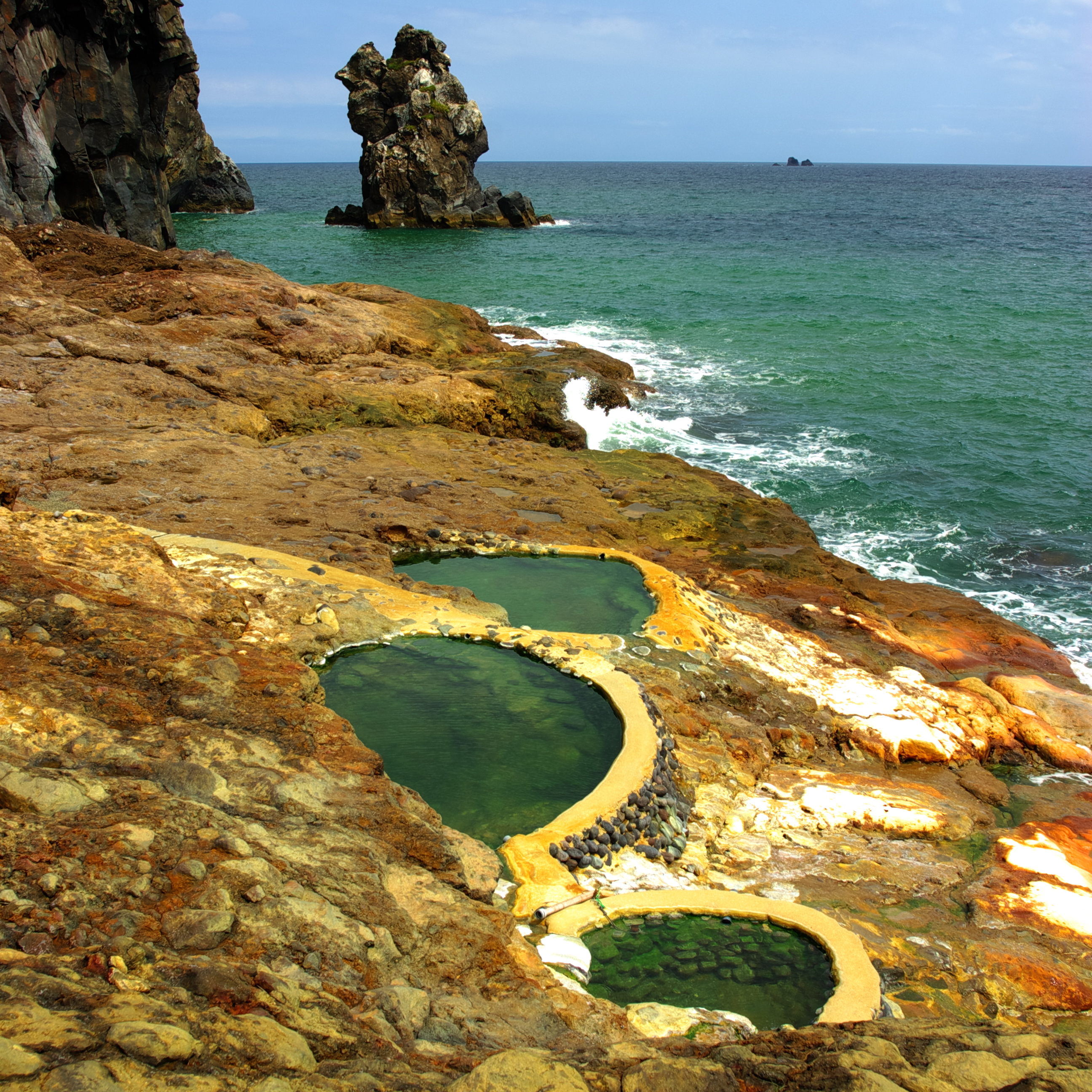 鹿児島県薩摩硫黄島の東温泉と東ノ立神